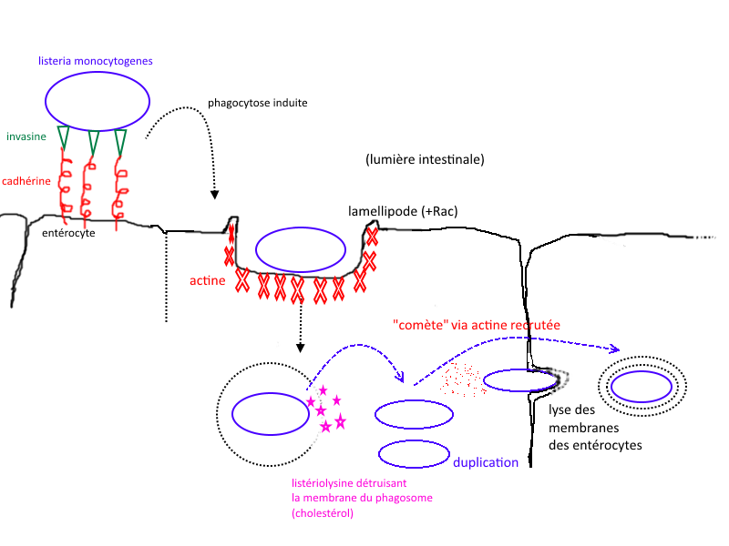 Schéma pour mode d'action de Listeria Monocytogenes